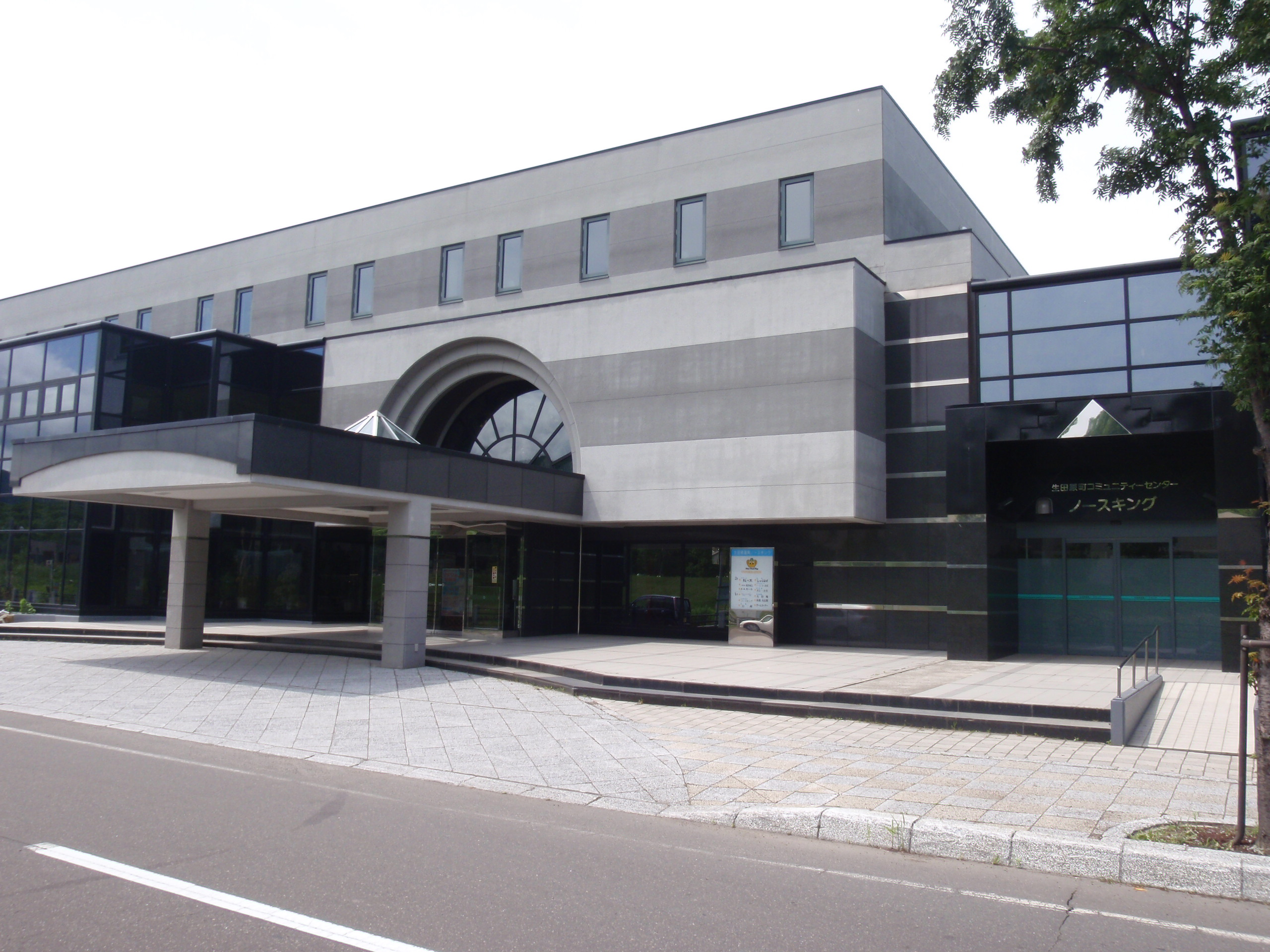 生田原温泉ノースキング